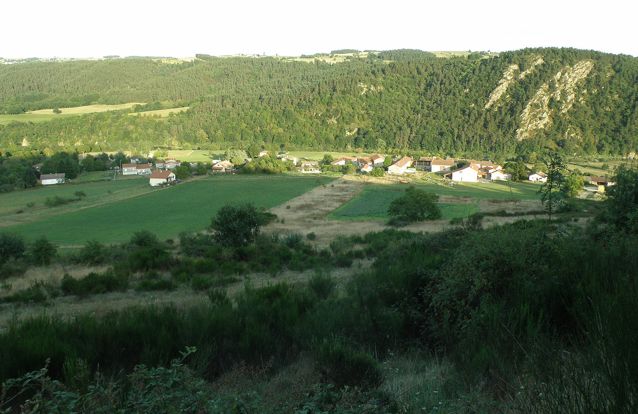 Beauzac, dép. de la Haute-Loire, France (Auvergne). Hameau de Brenas, dans le sud de la commune. Photo prise depuis le chemin qui, escaladant les Côtes du Suc, va au hameau de la Para. Les falaises à l'arrière-plan à droite sont les Rochers de Peyre. Sur la ligne de crête au centre gauche: hameau du Fraisse (comm. de Beauzac). La Loire, dont on aperçoit un peu les eaux à gauche, coule de droite à gauche au pied des falaises. (Coup d'oeil vers le sud-est.)